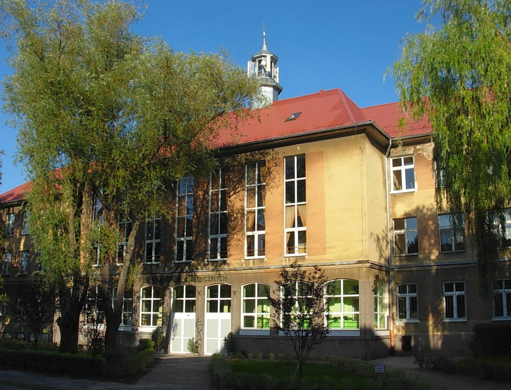 Zespół Szkół Chemicznych w Bydgoszczy